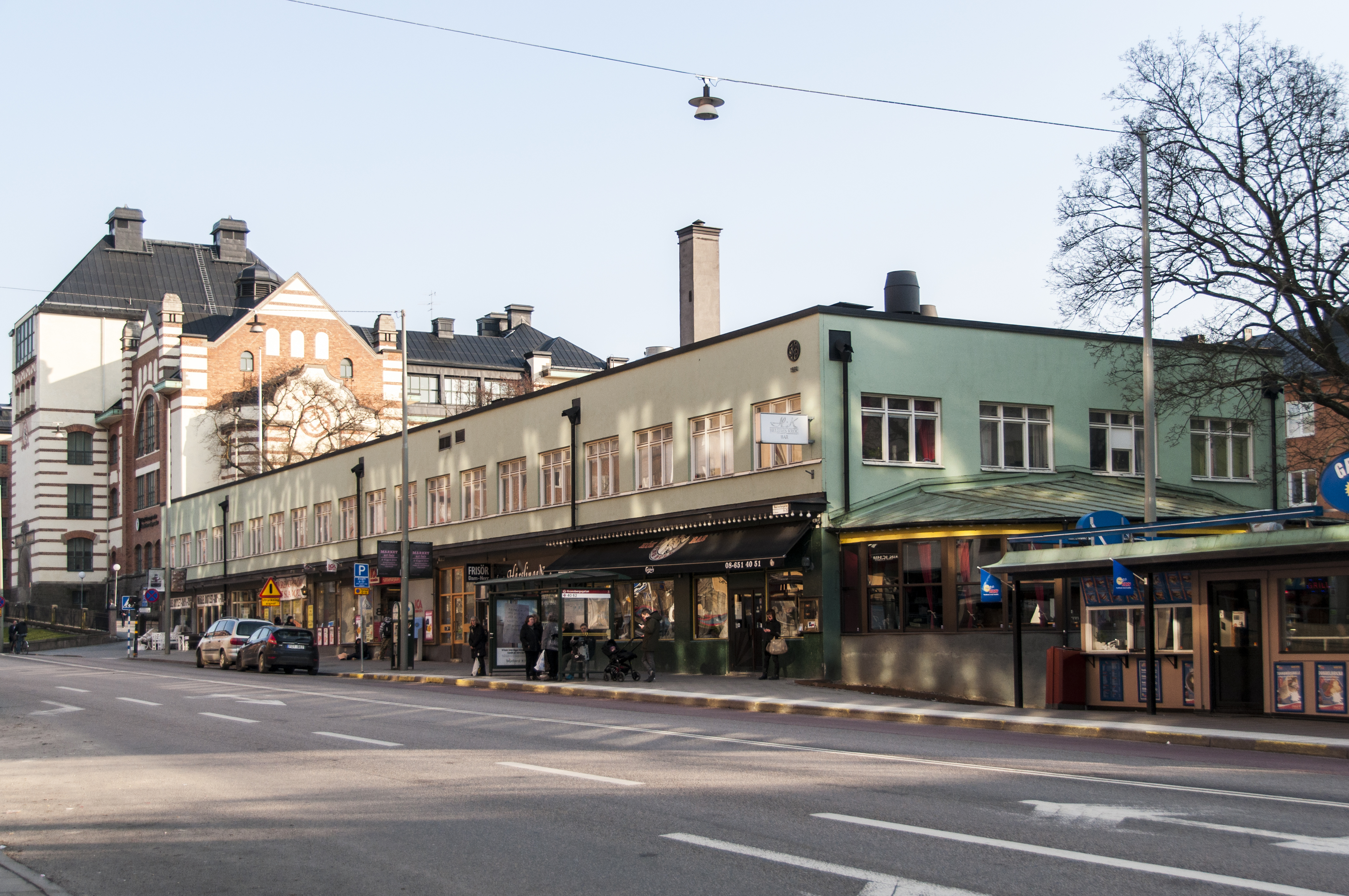 Basaren 1, Hantverkargatan 71-73, Baltzar von Platens gata 12, Nybyggnadsår 1931 - 1934, Björn Hedvall (Arkitekt), Pehr Nilsson (Byggmästare), Pehr Nilsson (Byggherre)